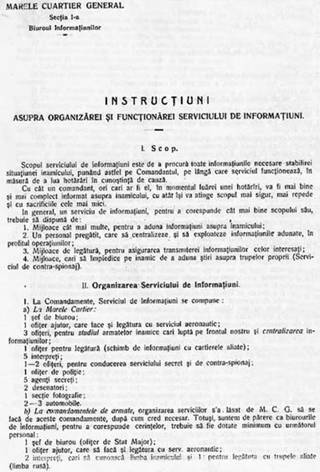 1917 - Instrucţiunile Marelui Cartier General privind organizarea Serviciului de Informaţii Imaginea poate fi folosită fără restricţii fiind un document oficial al statului român şi nefiind protejată de drepturi de autor la data publicării